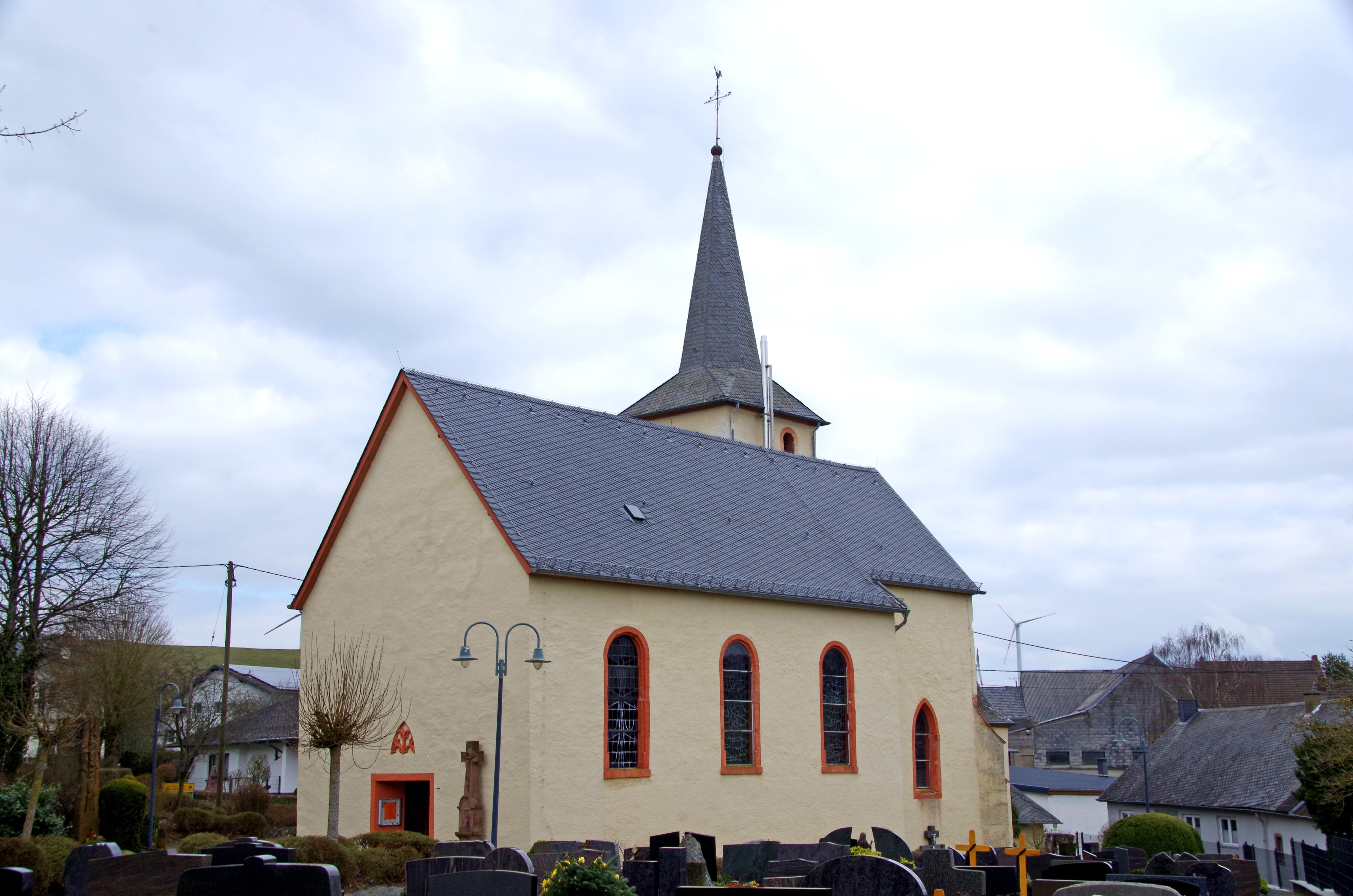 St. Lukas (Fleringen), Südwest-Ansicht